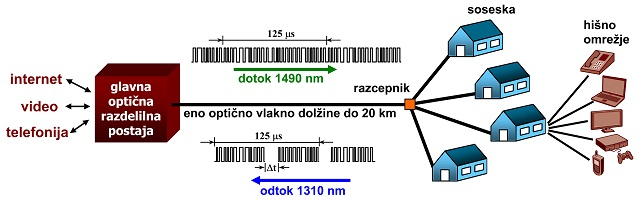 pasivno optično omrežje z gigabitno zmožnostjo (angl. Gigabit-capable Passive Optical Networks - GPON)